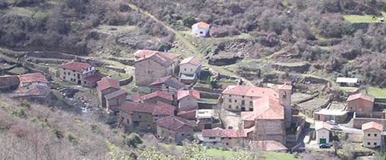 Aldeanueva de Cameros